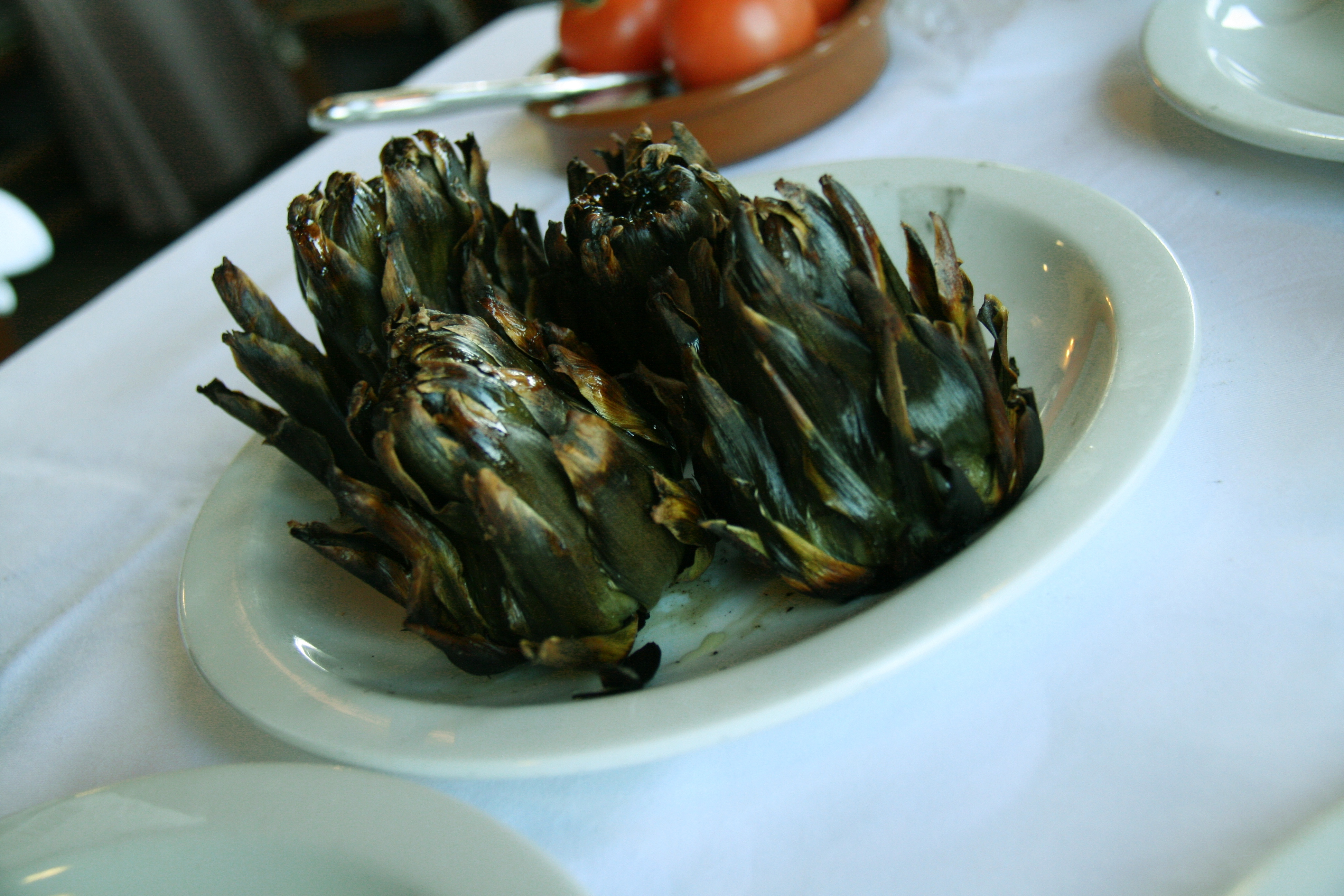 Alcachofas asadas - Camp Portel